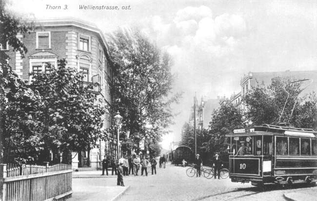 MickiewiczaSienkiewicza2Toruń